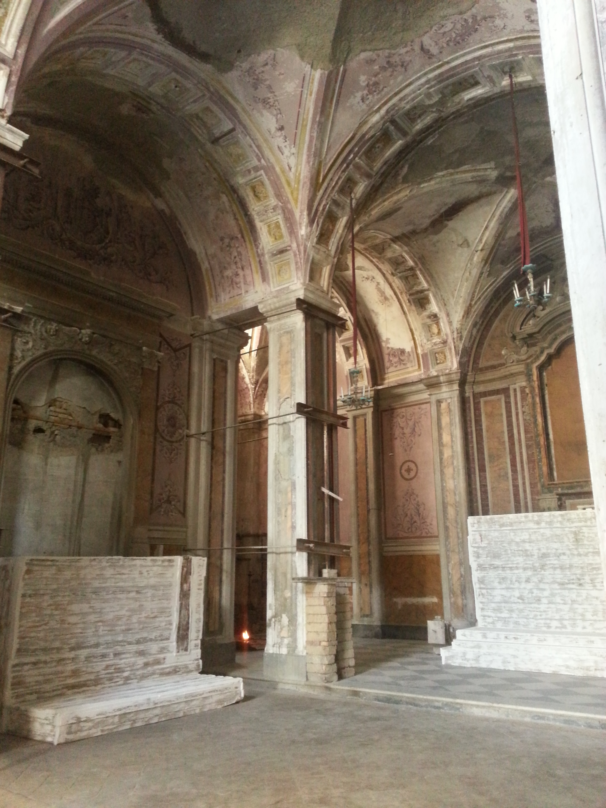 Interno dall'ingresso